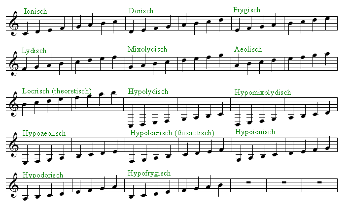 Eigen creatie, gemaakt dmv G sleutel scannen en vervolgens op van tevoren uitgemeten lijntjes geplakt, en vervolgens zelf in paint gemaakte nootjes erbij.